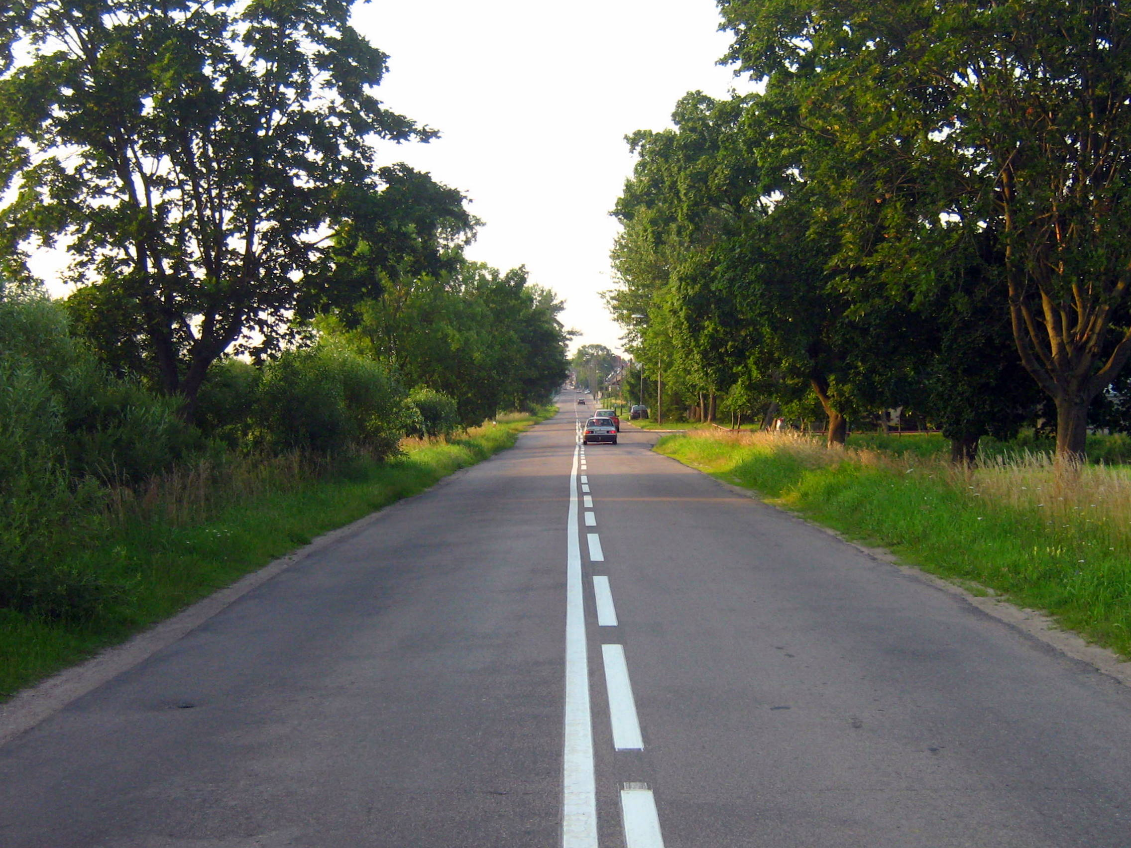 Droga wojewódzka nr 663 w Sejnach.